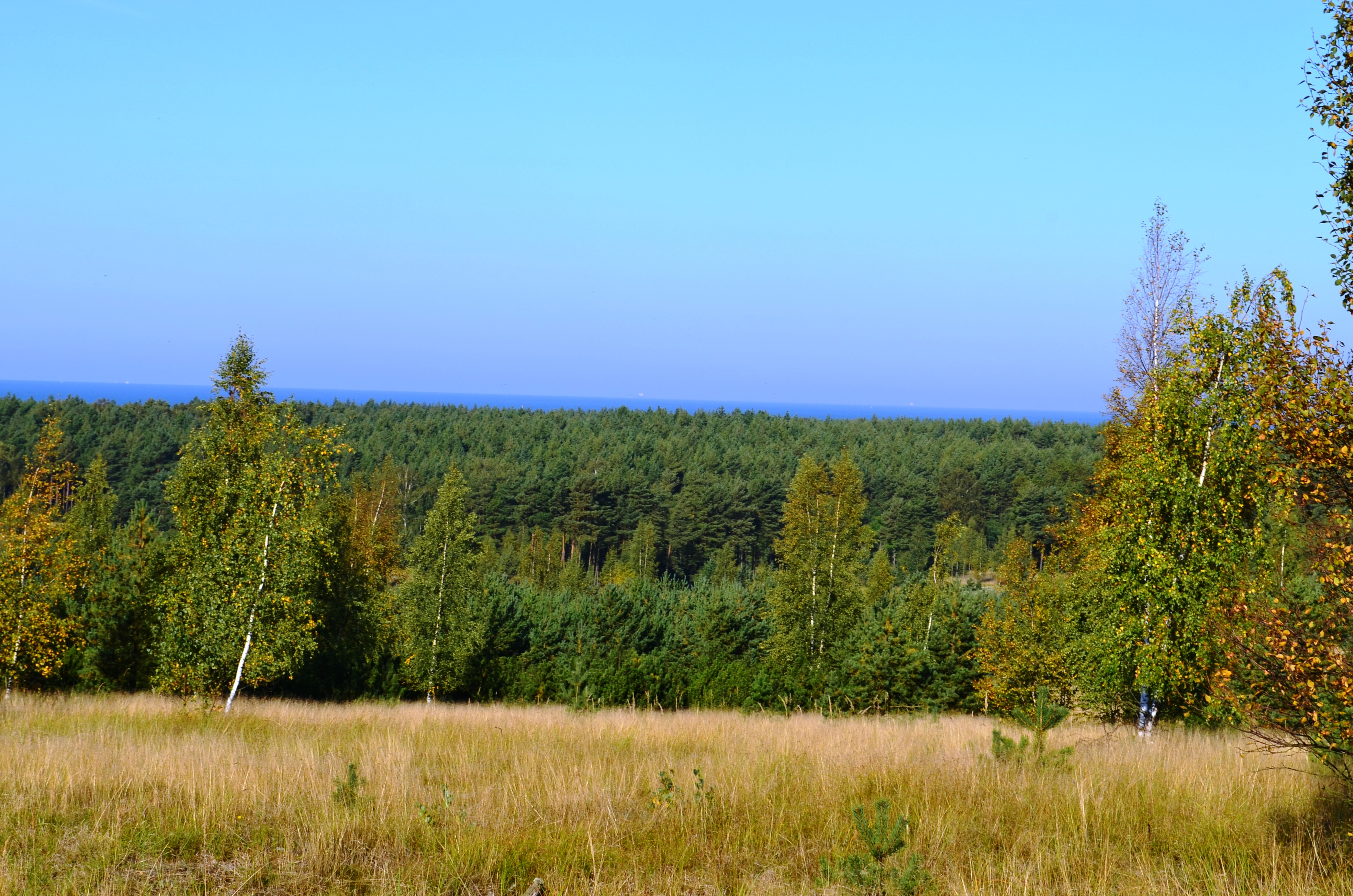 Vaizdas nuo Hageno kalno jūron, Smiltynė, Klaipėda